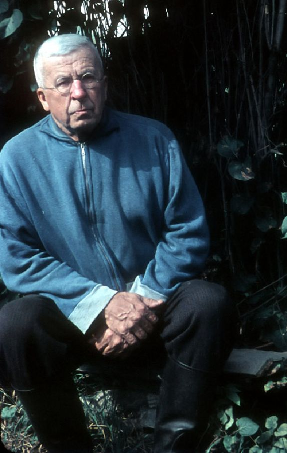 Ботаник П.А. Смирнов незадолго до кончины